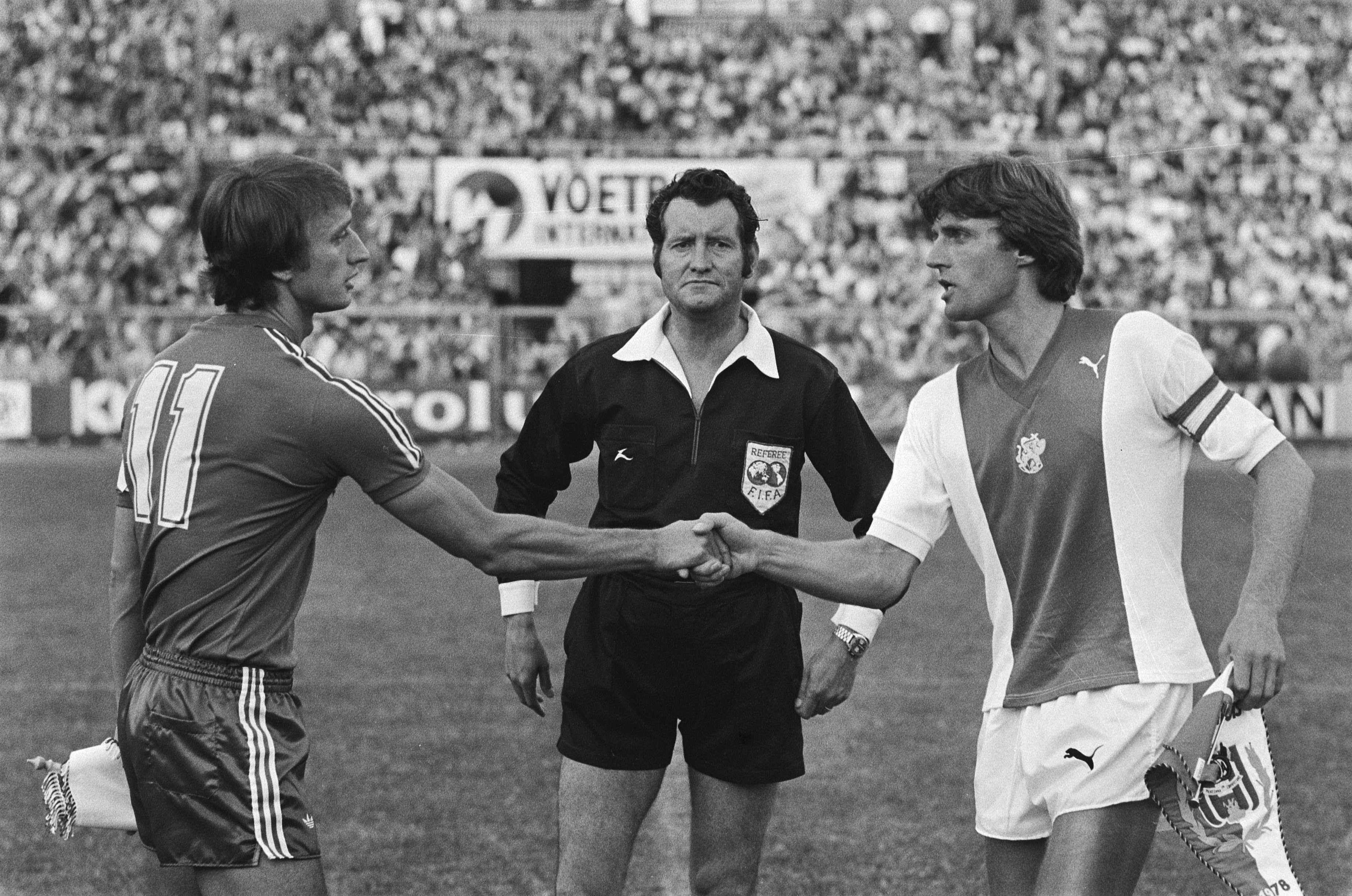 Collectie / Archief : Fotocollectie Anefo Reportage / Serie : [ onbekend ] Beschrijving : Amsterdam 703 voetbaltoernooi; Ajax tegen Anderlecht; , Rob Rensenbrink (l) en Ruud Krol (rechts) tijdens toss. Scheidsrechter Gerrit Berrevoets (midden) Annotatie : negatiefstrook: 17 Marinho (kop), 19 Jack van Zanten (kop) Datum : 20 augustus 1978 Locatie : Amsterdam, Noord-Holland Trefwoorden : scheidsrechters, sport, voetbal Persoonsnaam : Berrevoets, Gerrit, Krol, Ruud, Rensenbrink, Rob Fotograaf : Peters, Hans / Anefo Auteursrechthebbende : Nationaal Archief Materiaalsoort : Negatief (zwart/wit) Nummer archiefinventaris : bekijk toegang 2.24.01.05 Bestanddeelnummer : 929-8642